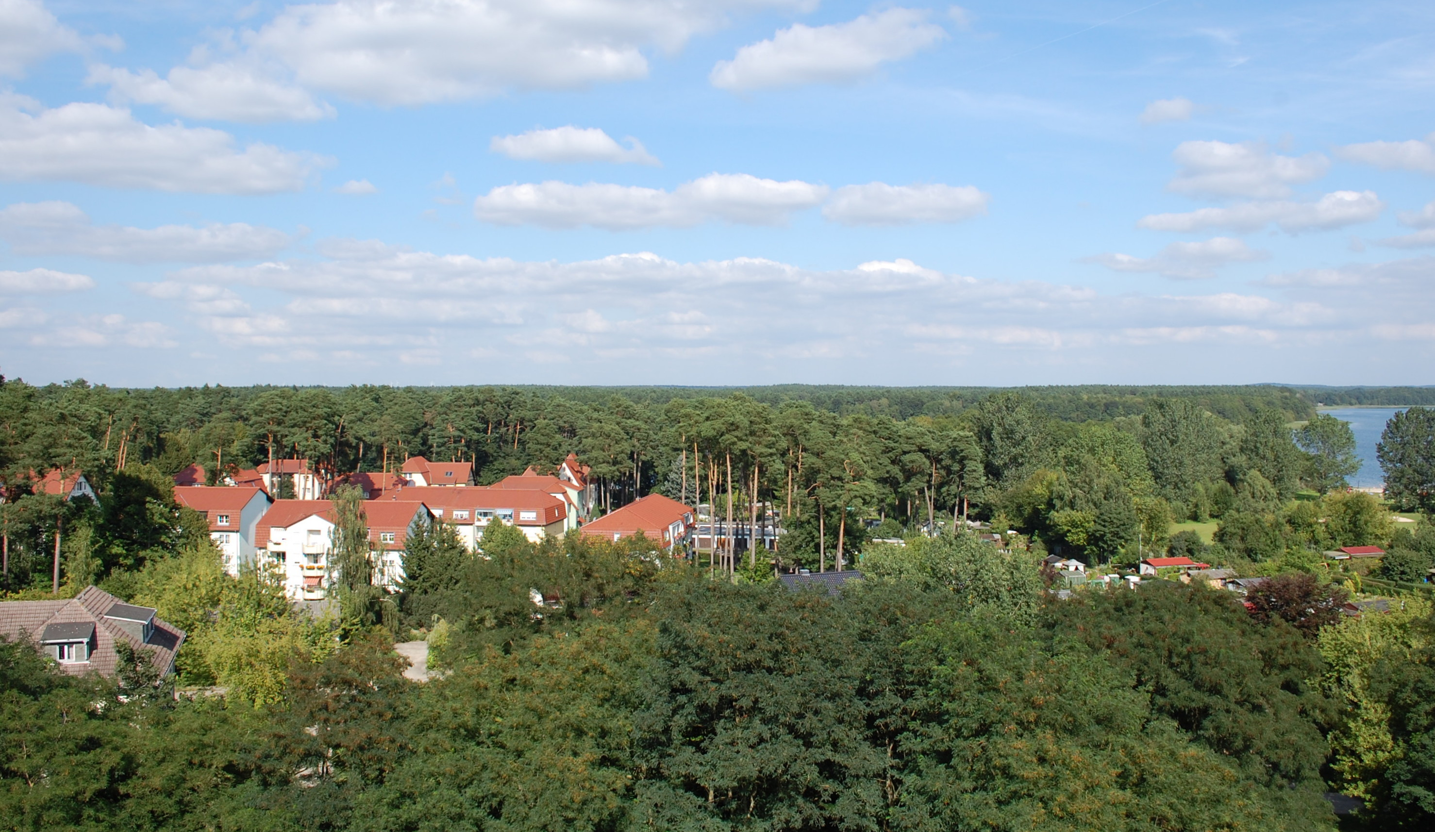 Ortsteil Postheim, Blick vom Seehotel